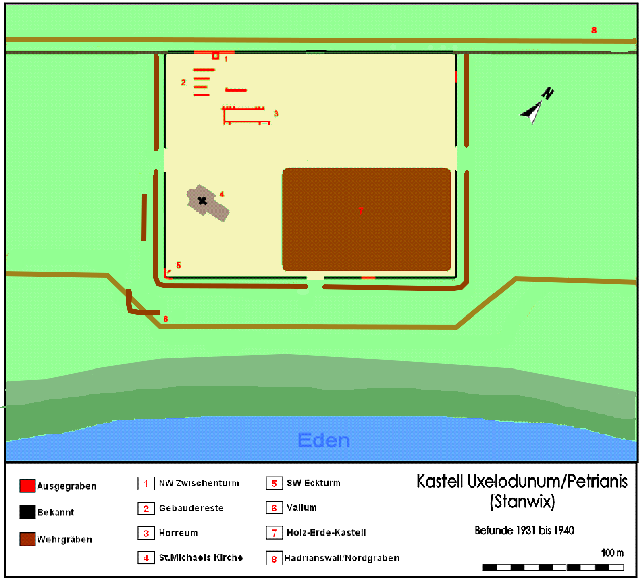 Befundplan des Kastell Uxelodunum (Stawix), Hadrianwall, Ausgrabungen 1931 - 1940.